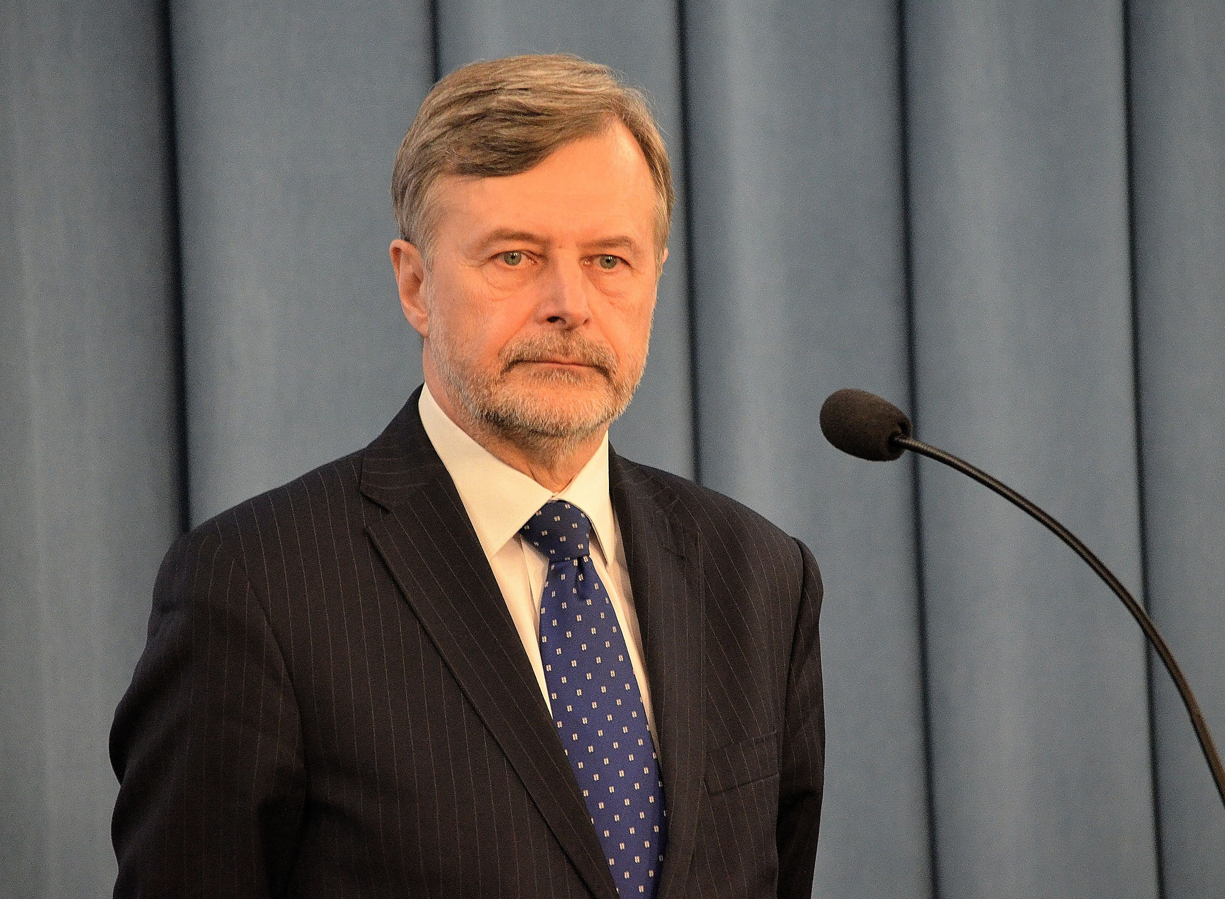 Marek Balicki